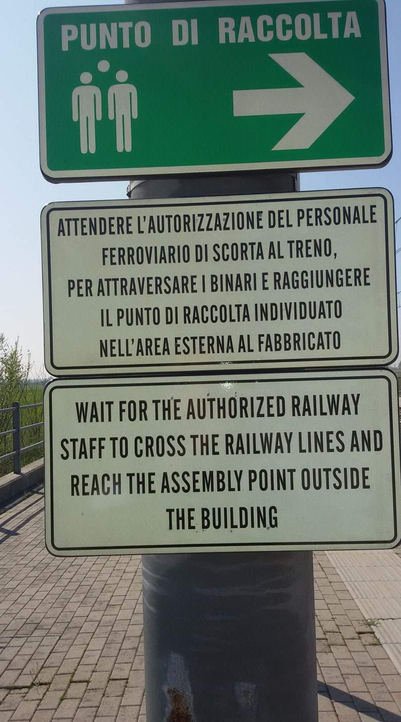 La stazione ferroviaria di Mirandola si trova all'interno di in un'area ad alto rischio industriale ai sensi della Direttiva Seveso per la presenza della vicina azienda Plein Air International che produce bombole e cartucce da campeggio contenenti gas GPL. In caso di incidente o allarme i viaggiatori devono allontanarsi e raggiungere i punti di raccolta situati nella parte meridionale dei marciapiedi della stazione (in direzione Bologna), senza utilizzare il sottopassaggio per il rischio di asfissia: il GPL allo stato gassoso ha infatti una densità superiore a quella dell'aria e in caso di fuoriuscite accidentali tende a concentrarsi ristagnando al suolo e nelle cavità, causando situazioni di accumulo molto pericolose, a rischio di incendio o asfissia.